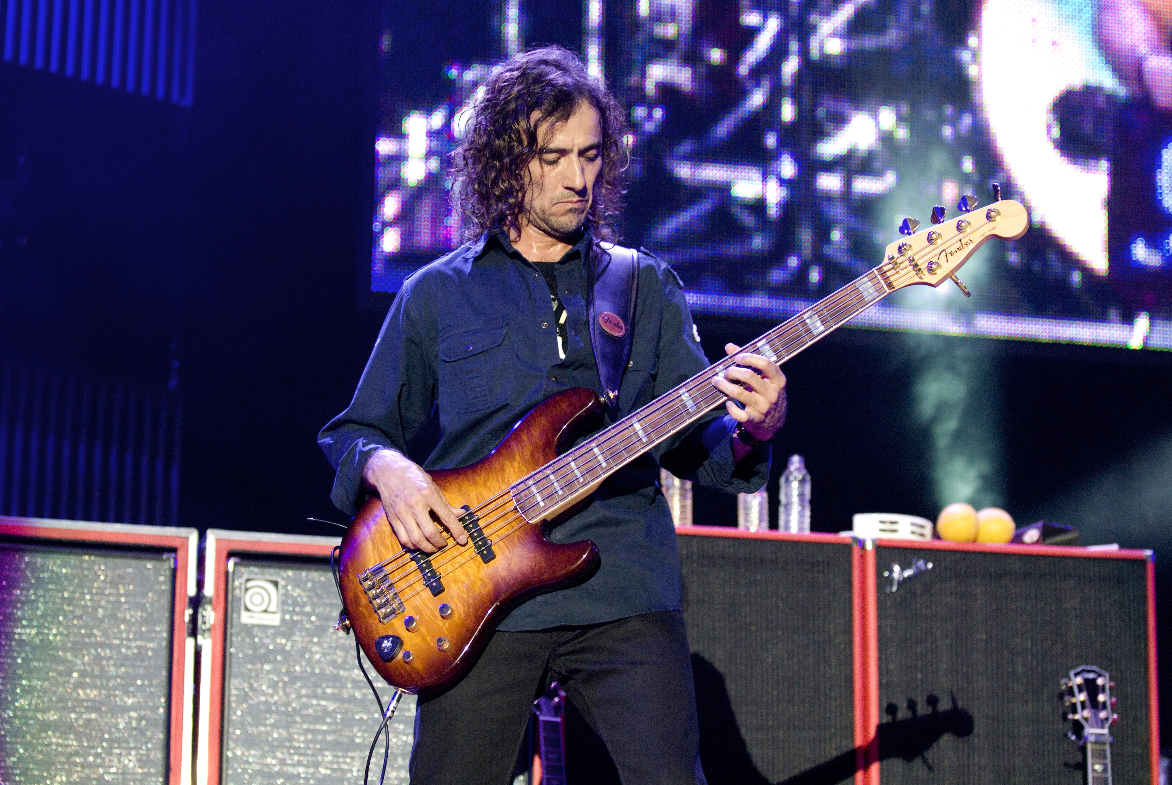 Maná